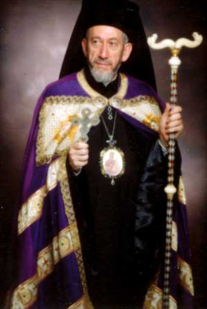 Sotir Ferrara (1937), Eparca di Piana degli Albanesi.